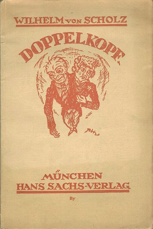 Wilhelm von Scholz: Doppelkopf. Eine Groteske für Marionetten. Mit Umschlagzeichnung und drei Zeichnungen von Rolf von Hörschelmann. Den Bühnen gegenüber Manuscript. München Hans Sachs-Verlag, 1918